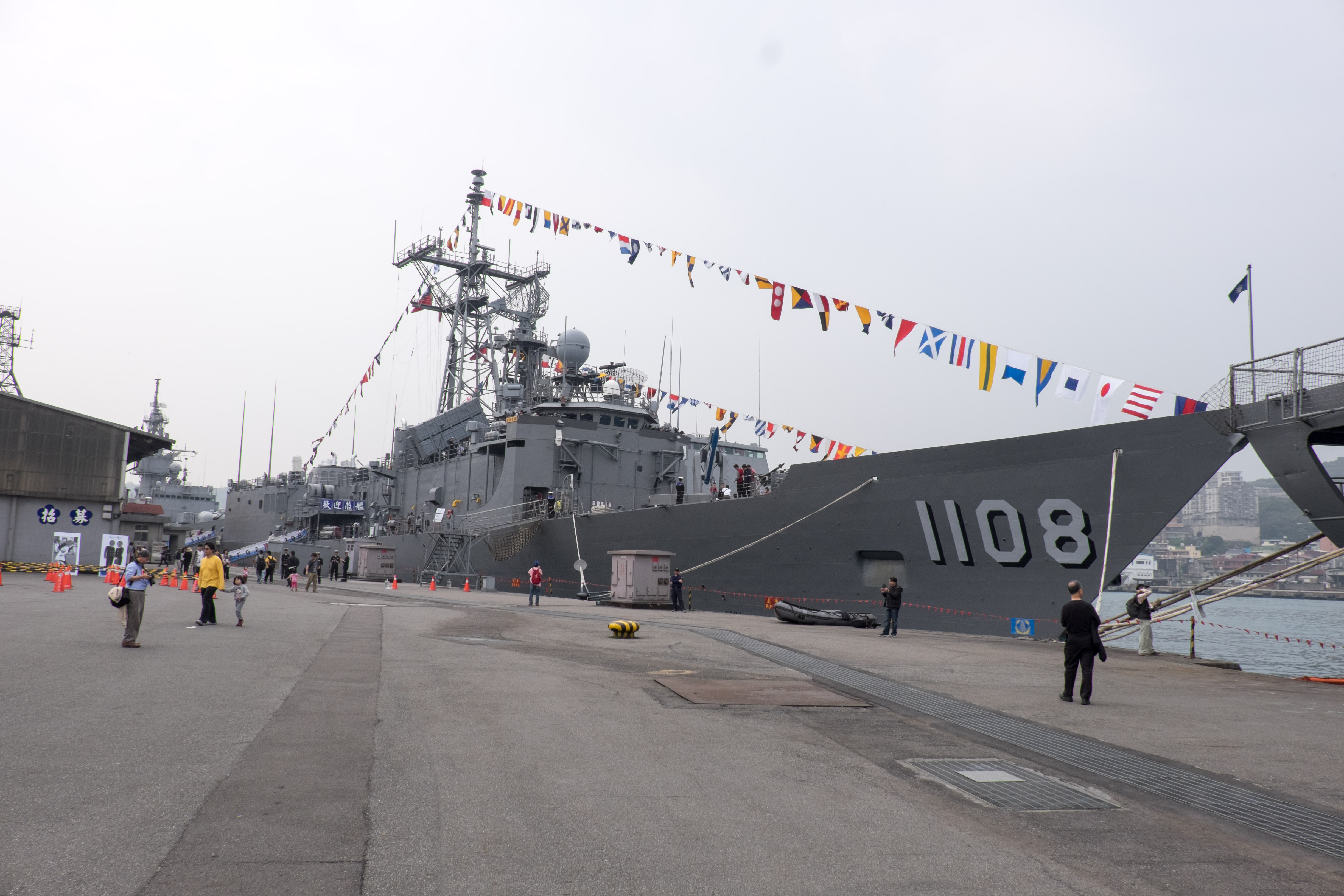 2015年3月16日中午，中華民國海軍104年敦睦遠航訓練支隊基隆訪問，停泊基隆港東五號海軍碼頭的巡防艦班超（PFG2-1108）。